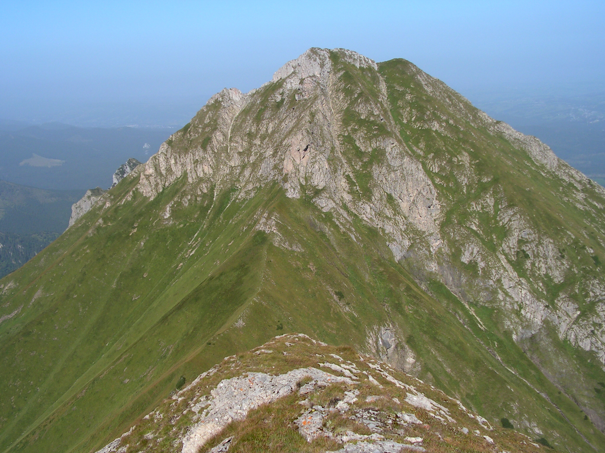 Havran from Ždiarska vidla